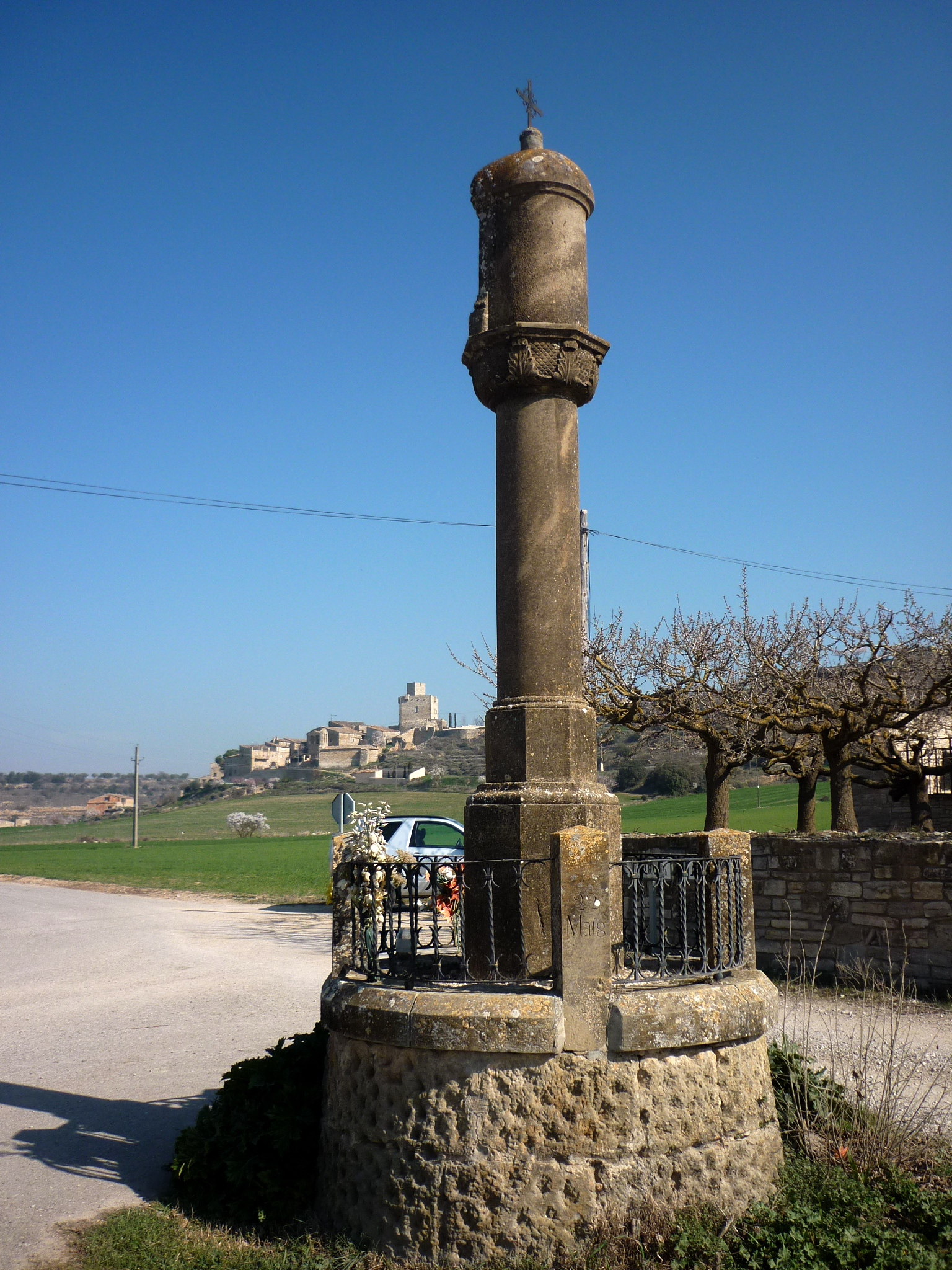 Columna de Sant Roc (Cervera), amb el castell de Malgrat al fons